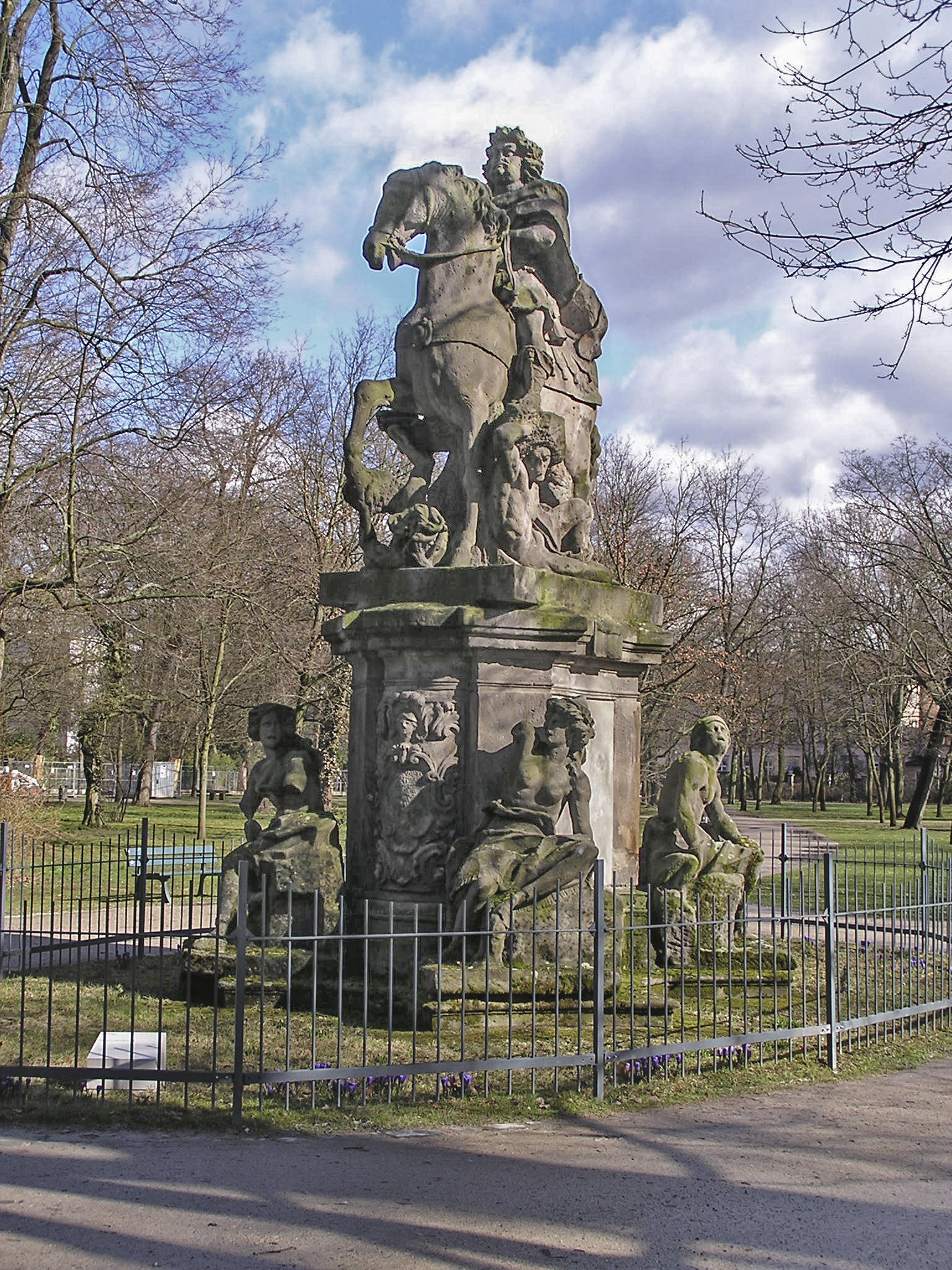 Hugenottenbrunnen im Schlossgarten Erlangen.